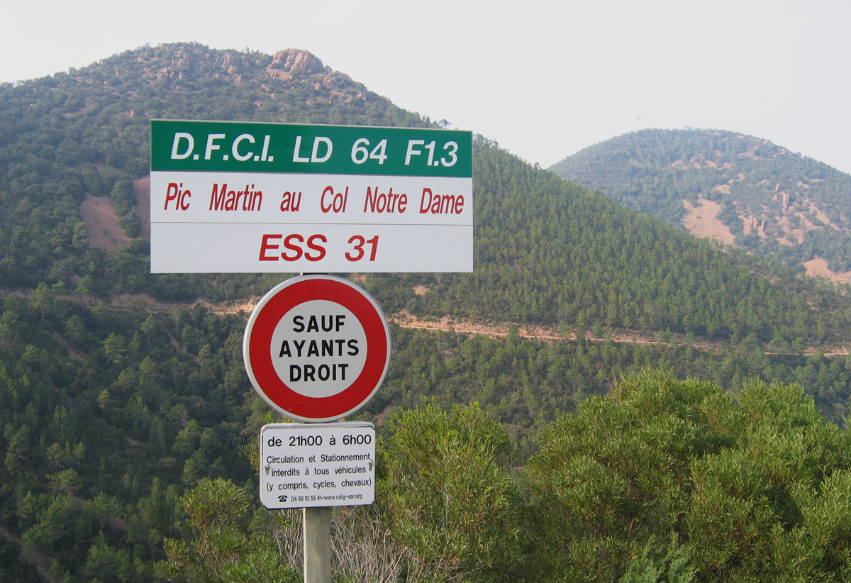 Panneau de coordonnées de la Défense des forêts contre l'incendie (DFCI) dans le Massif de l'Esterel, Côte d'Azur, France